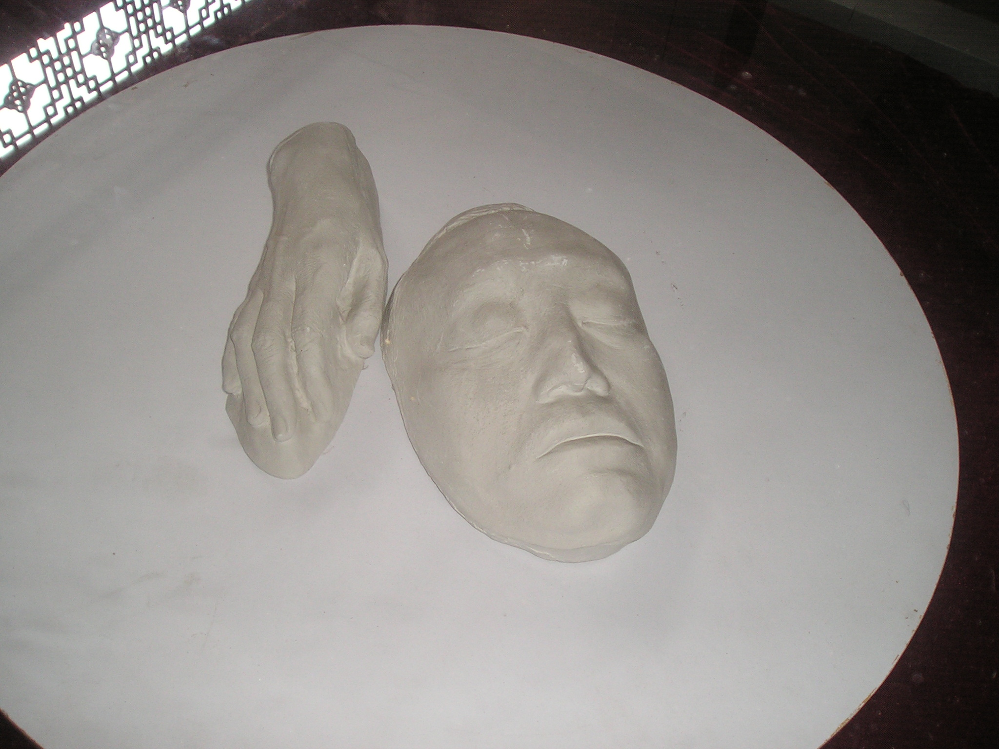 陶行知头模、手模。